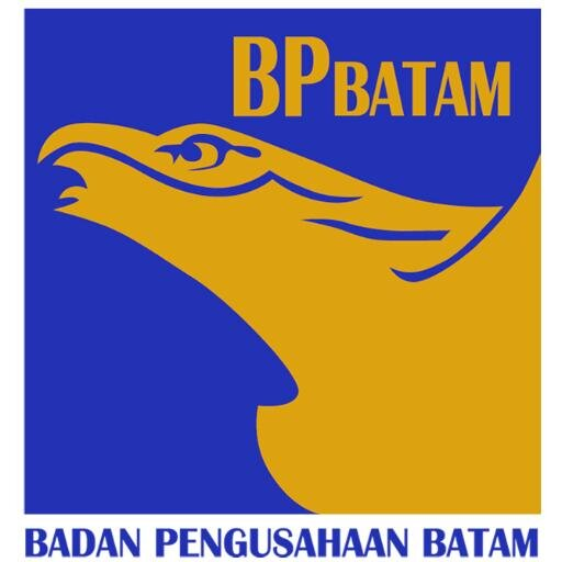 Logo Resmi Badan Pengusahaan Kawasan Perdagangan Bebas dan Pelabuhan Bebas Batam (BP Batam)